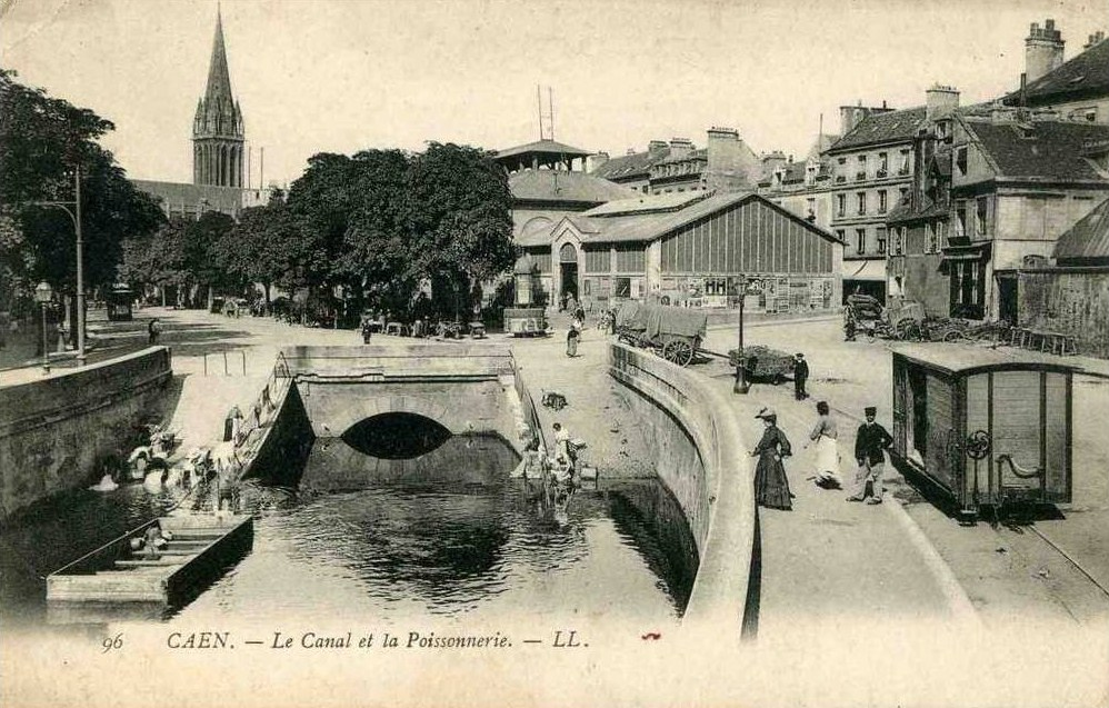 Caen, l'abreuvoir, les lavoirs et les halles